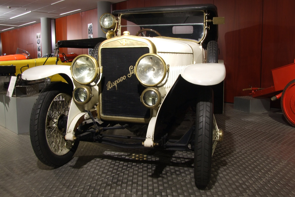 Hispano Suiza 16HP (Tipo 30), 1922